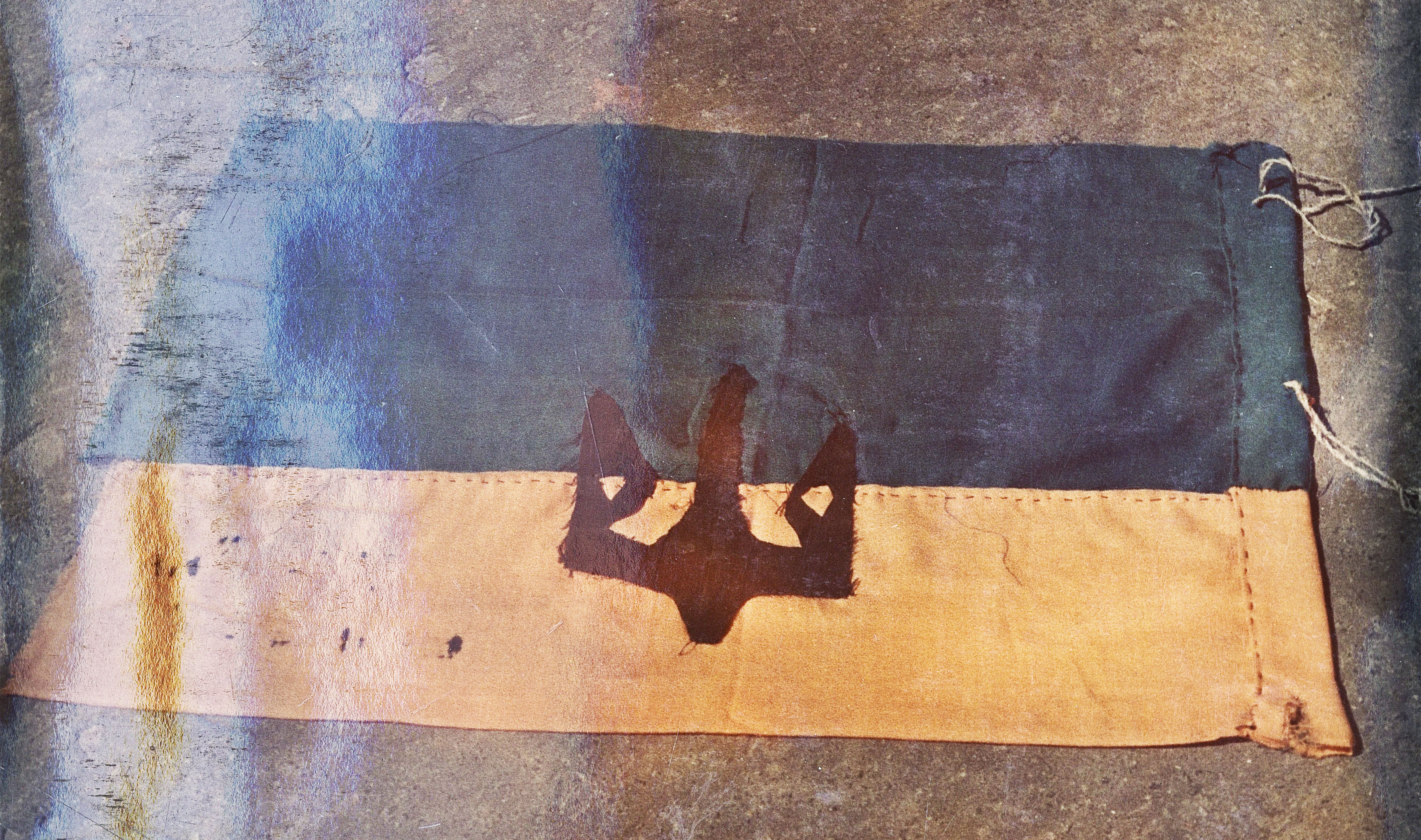 У ніч проти 1 травня 1966 року, напередодні Дня солідарності трудящих, Г. Москаленко й В. Кукса скинули і порвали червоний прапор і встановили синьо-жовтий стяг над будівлею центрального корпусу Київського інституту народного господарства (нині – Київський національний економічний університет ім. В. Гетьмана).